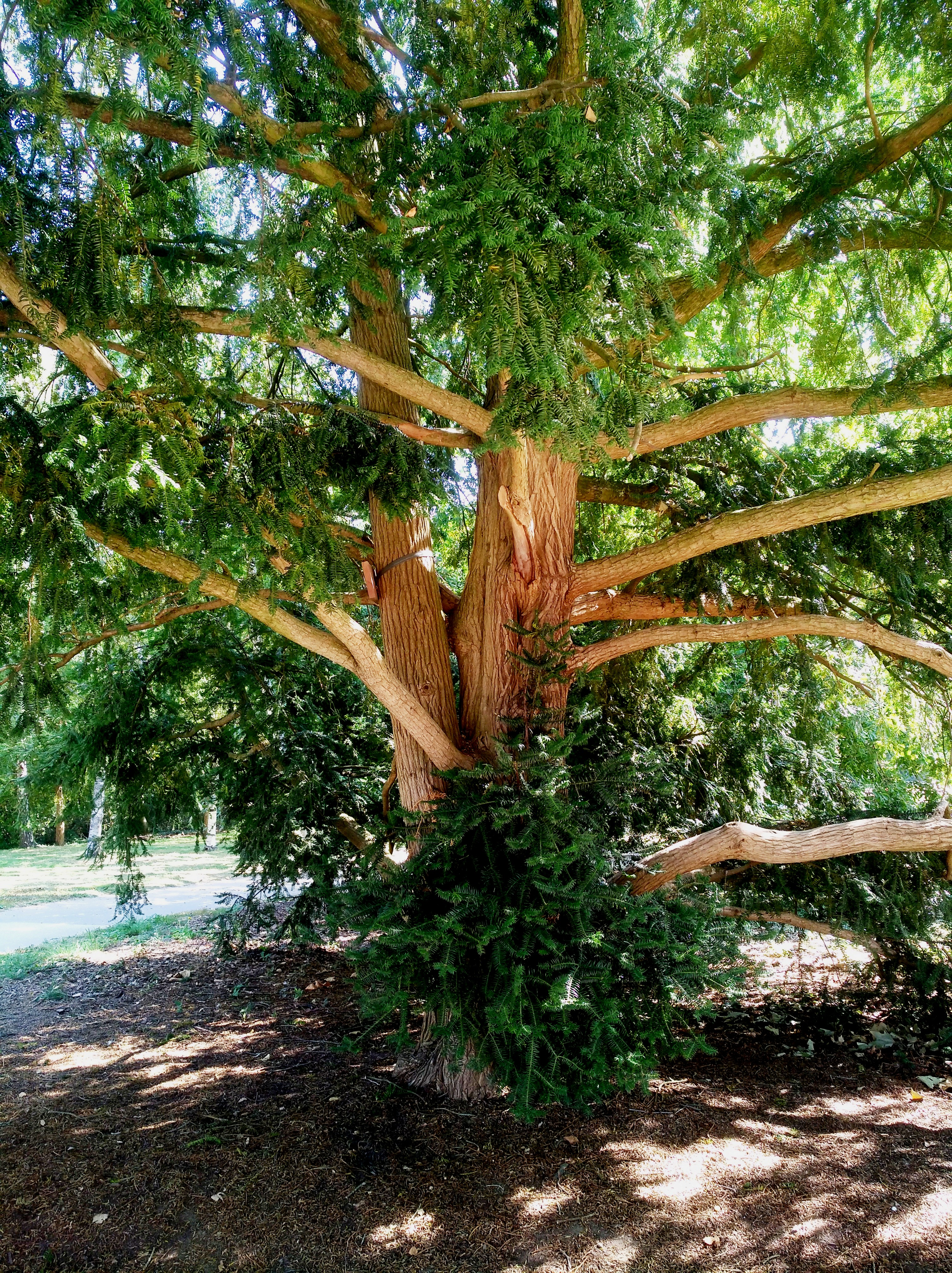 Un if du Japon, dans le parc Napoléon III à Vichy (Allier, France).